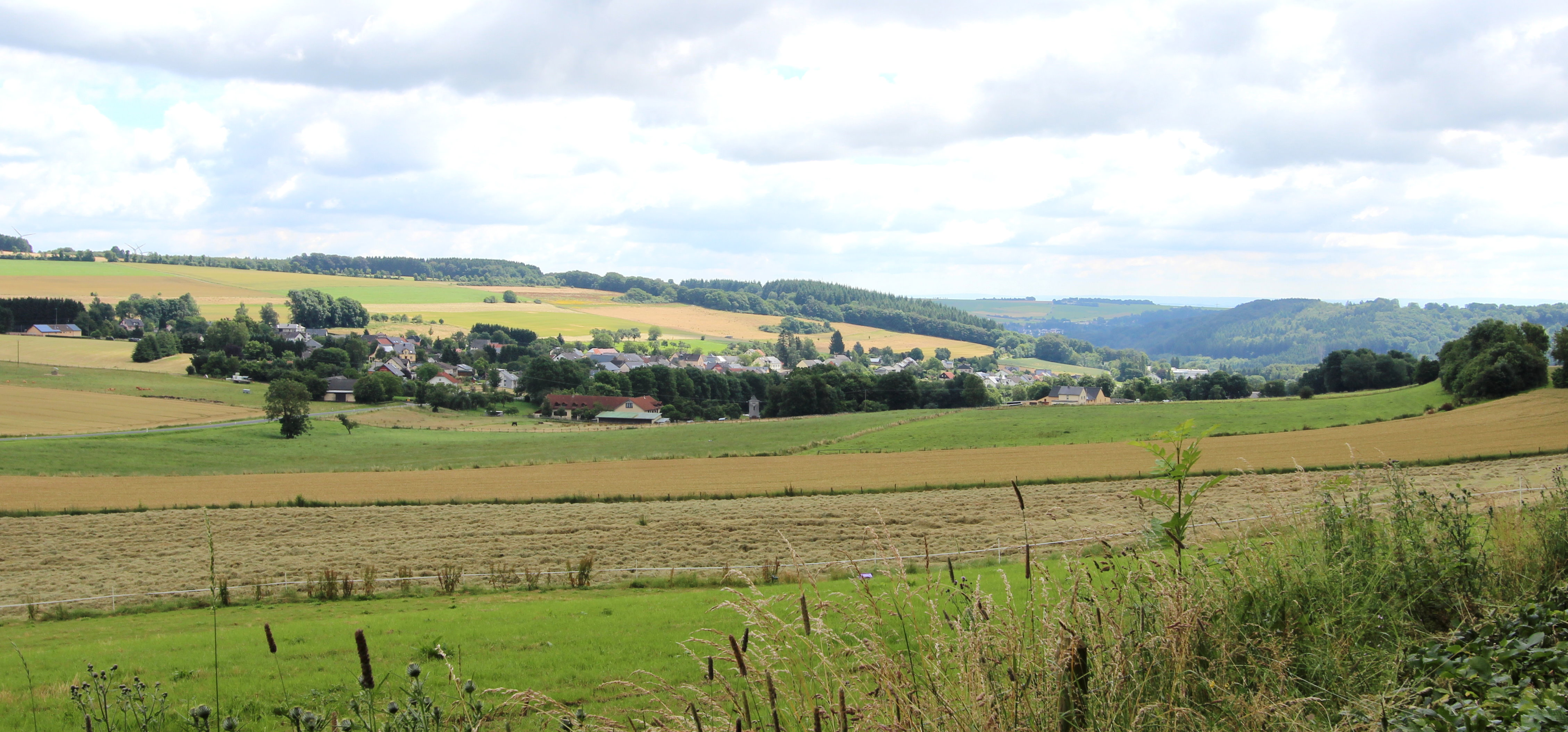 54655 Malbergweich in der Eifel. Aufnahme aus Nord-Westen von 2016.